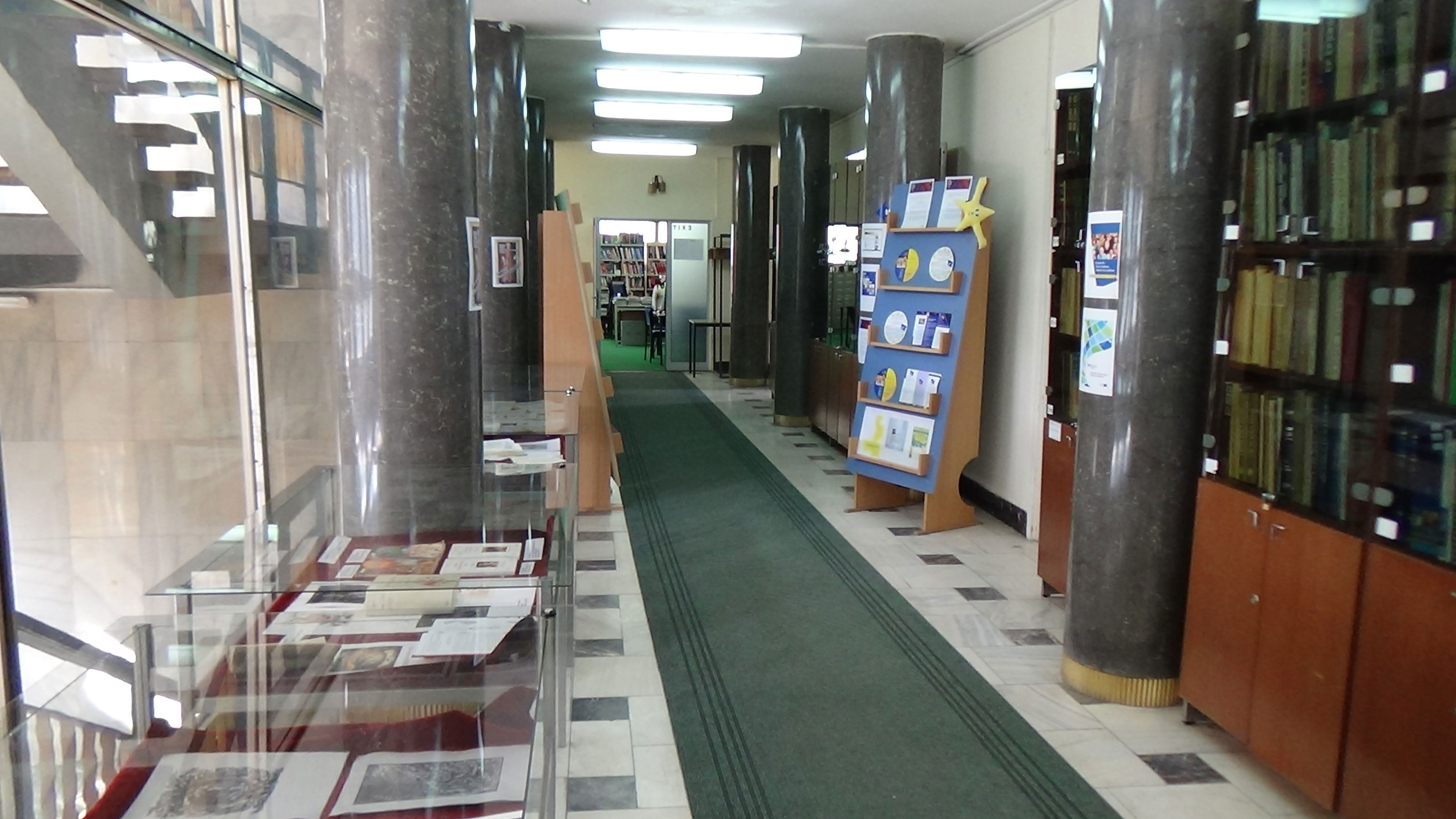 Hodnik biblioteke Kruševac.